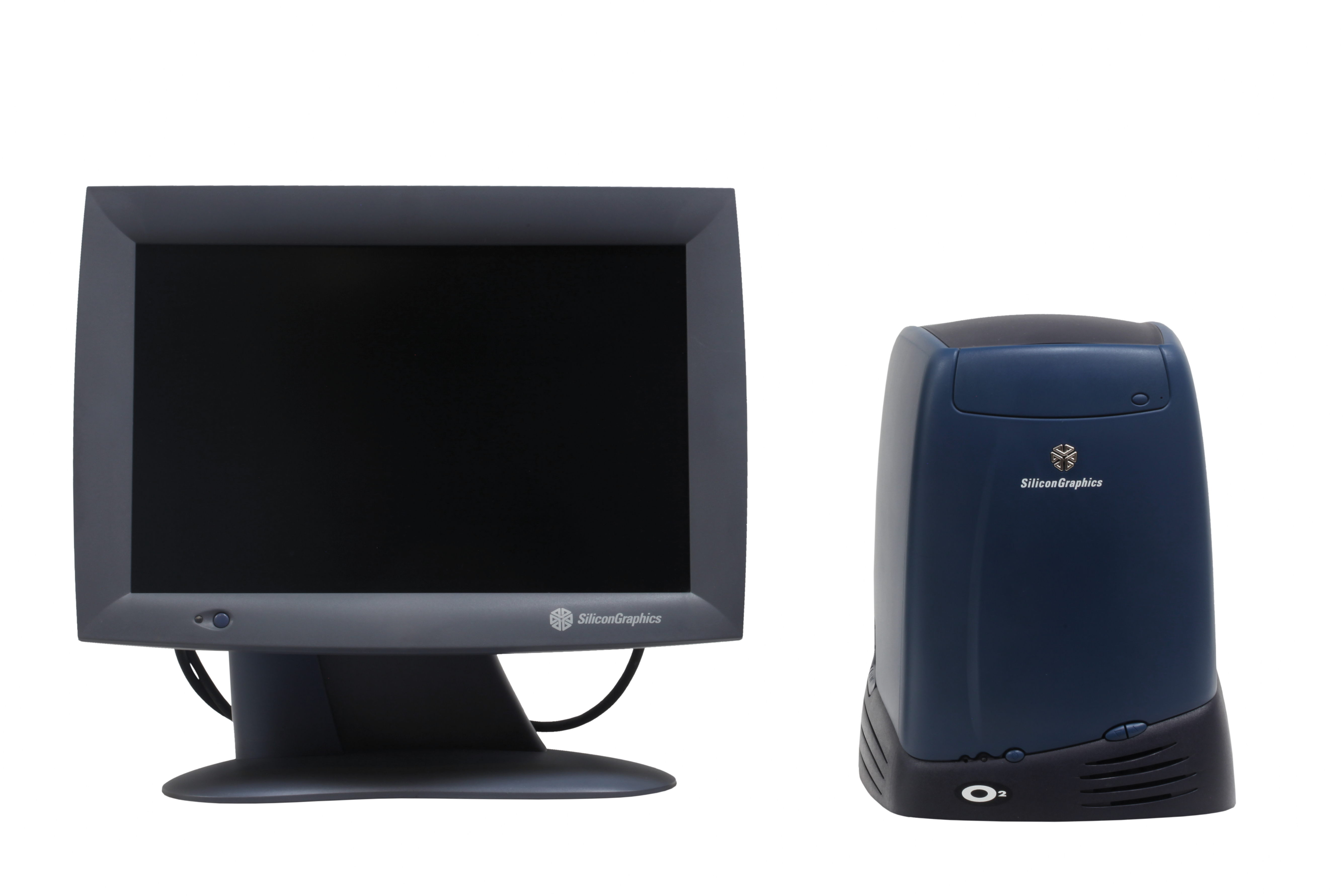 SGI O2. On display at the Musée Bolo, EPFL, Lausanne.